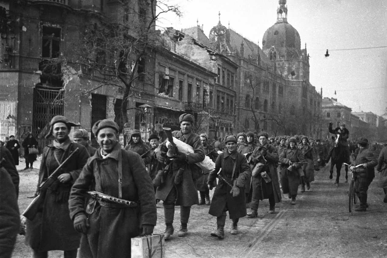 Üllői út a körút felől nézve, szemben az Iparművészeti Múzeum. Location: Hungary, Budapest IX. Tags: Soviet soldier, weapon, machine gun, PPS machine gun, Budapest Title: Üllői út a körút felől nézve, szemben az Iparművészeti Múzeum.